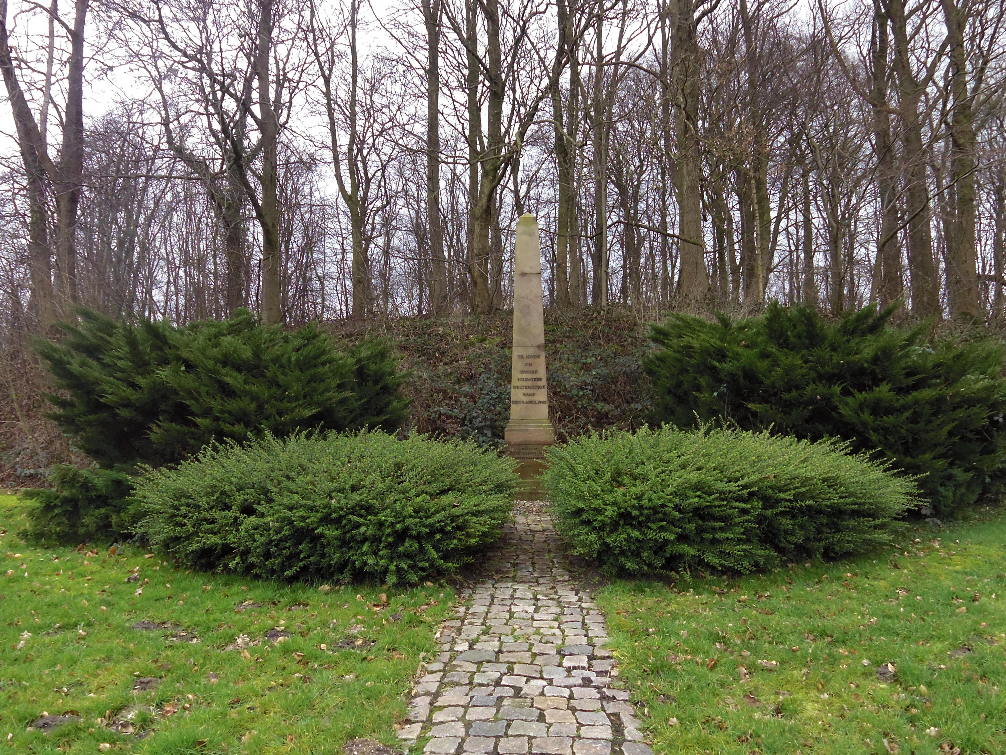 Til minde om danske soldaters heltemodige kamp den 9. april 1940